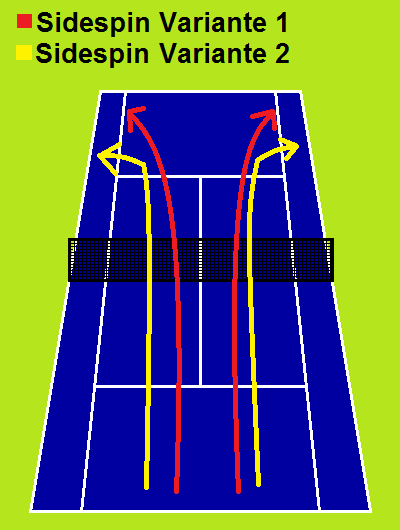 Deitsch: Verschiedenes Flug- bzw. Absprungverhalten verschiedener Sidespinvarianten.